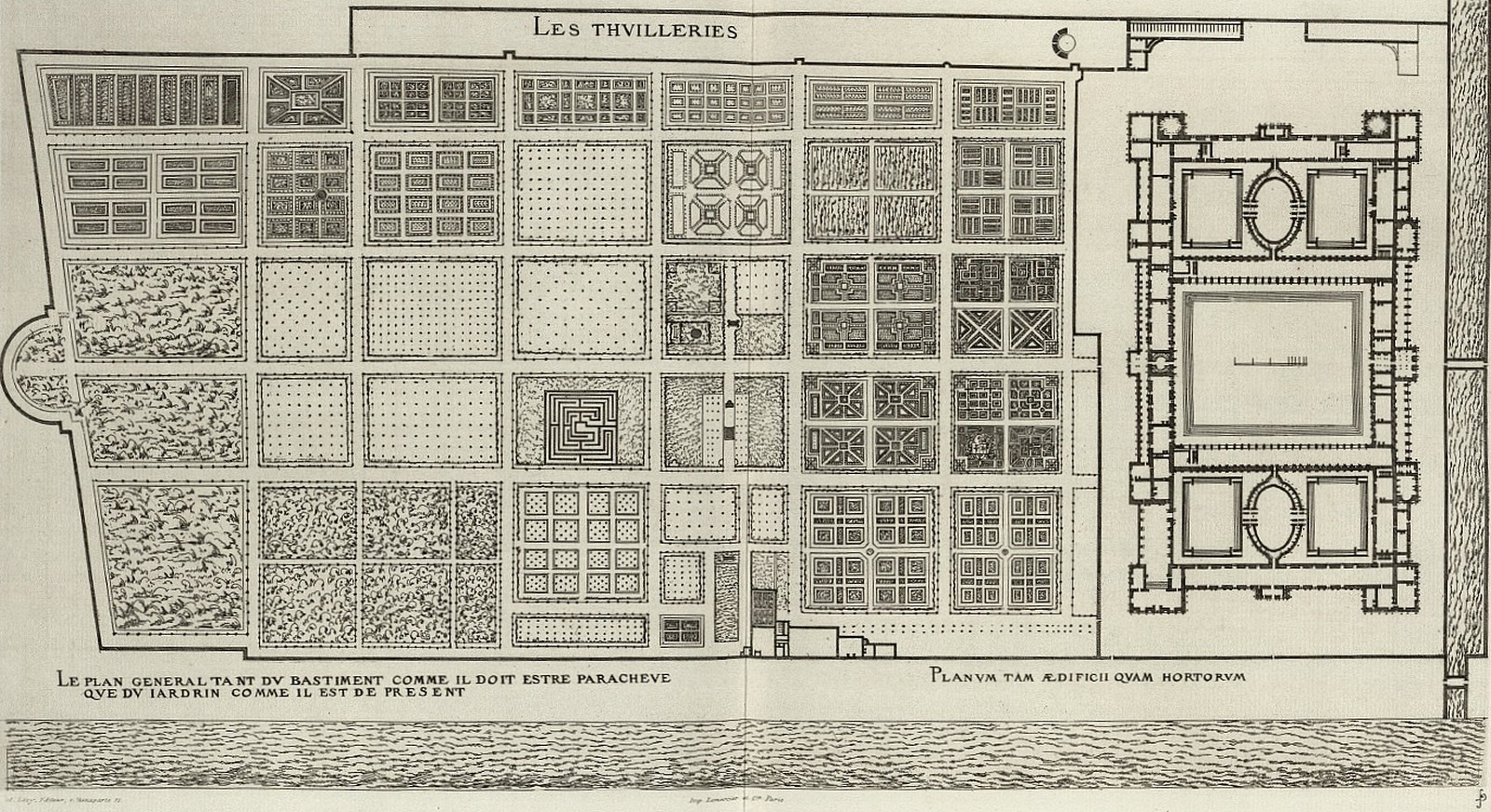 Plan du Palais des Tuileries initialement envisagé par Delorme et jardins. D'après Androuet du Cerceau.